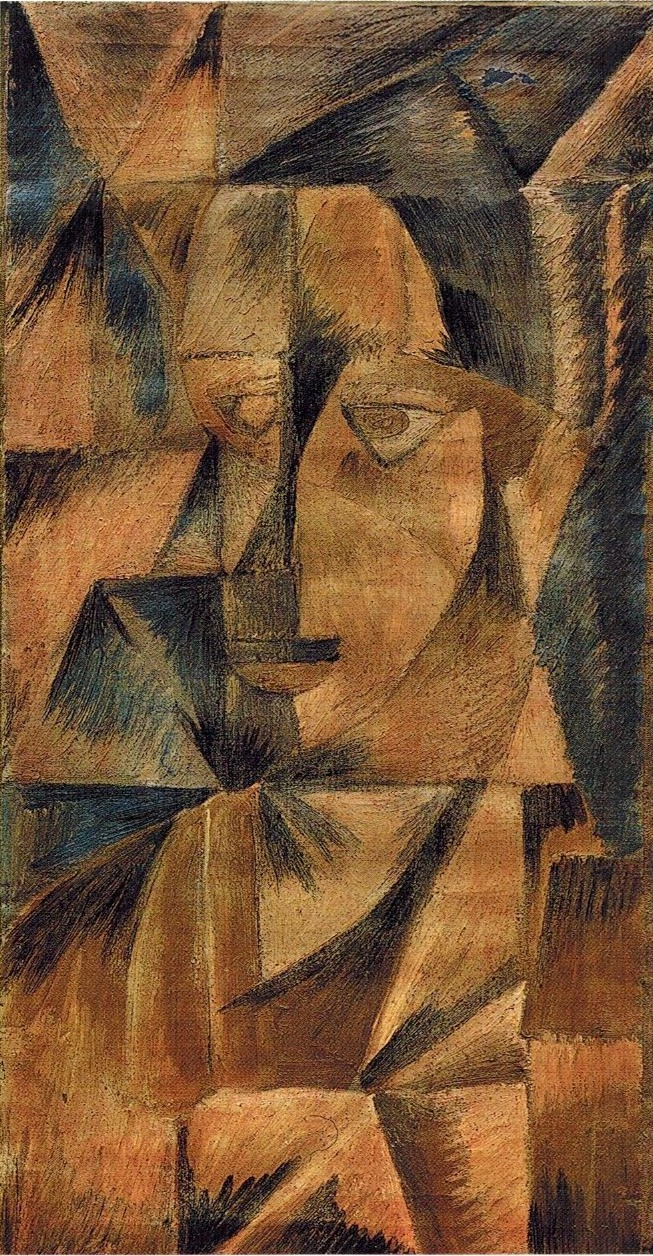 Михаил Ле-Дантю. Портрет Мориса Фаббри. 1912. Холст, масло. 60,4х31,5.